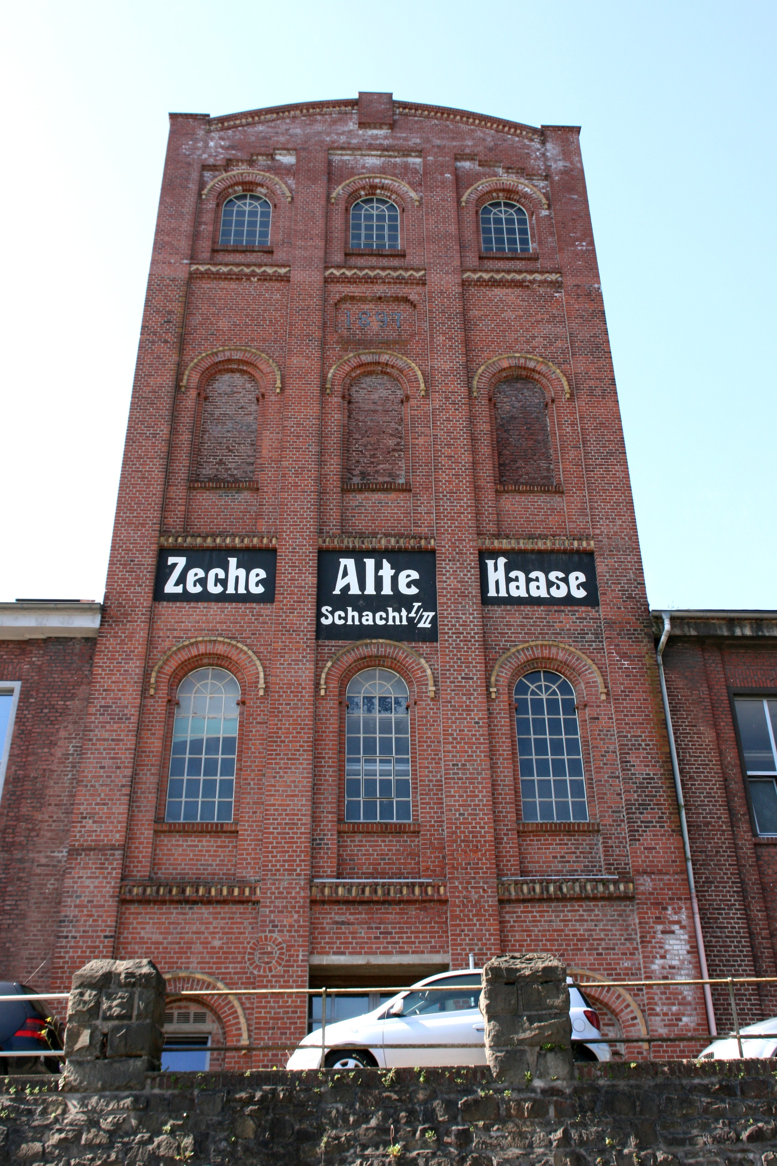 Malakow-Turm über Schacht I/II (Schacht Julie) der Zeche Alte Haase, Hattinger Straße in Sprockhövel